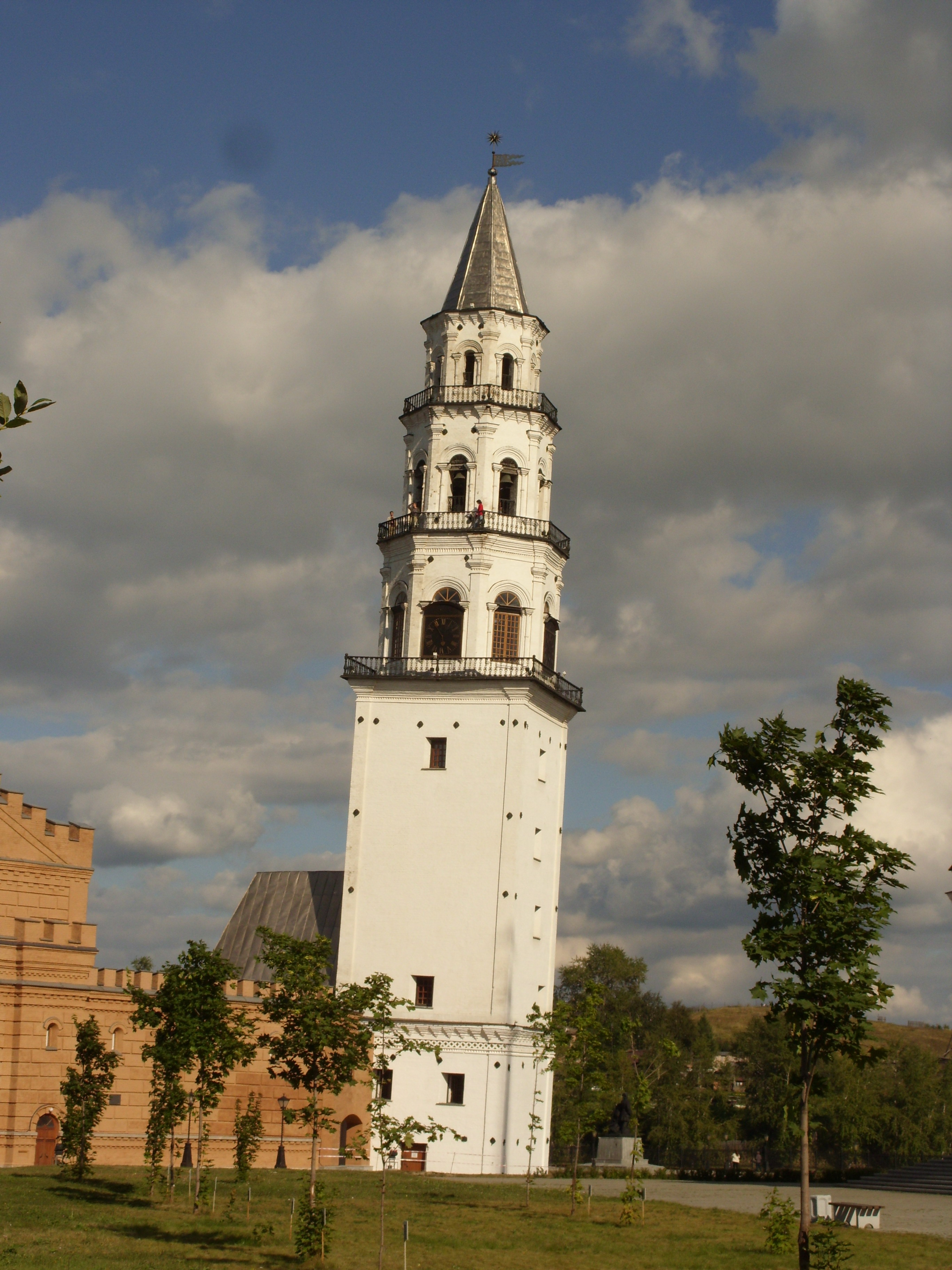 Башня Демидовых. Невьянск